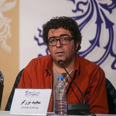 مجید برزگر - بهمن ۱۳۹۸